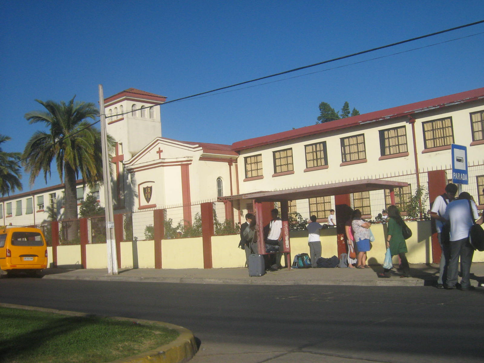 El Instituto Regional Federico Errázuriz, en 2007.